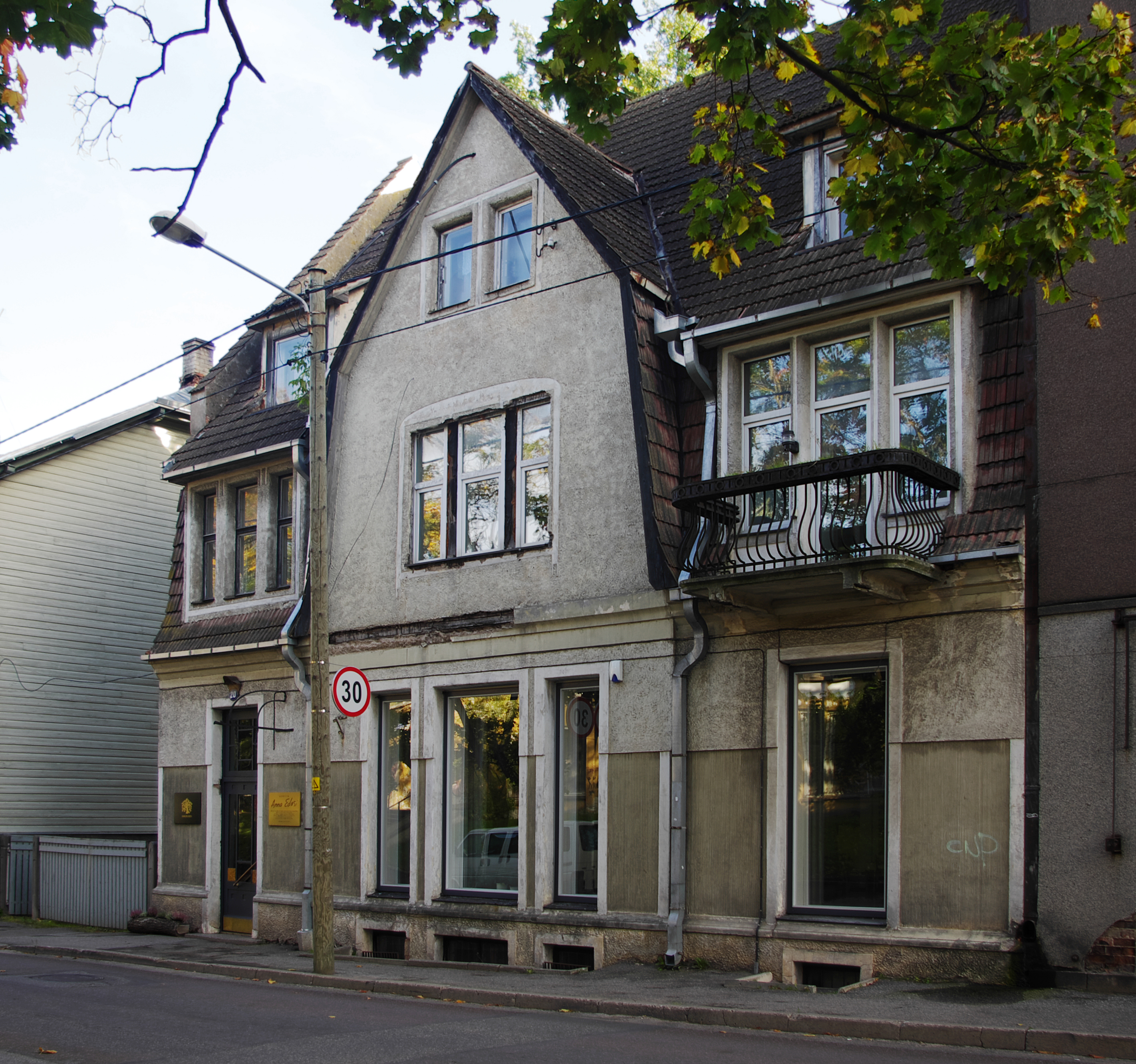 Elamu-apteegihoone Tartus Tähe 20, 1924-1926.a.